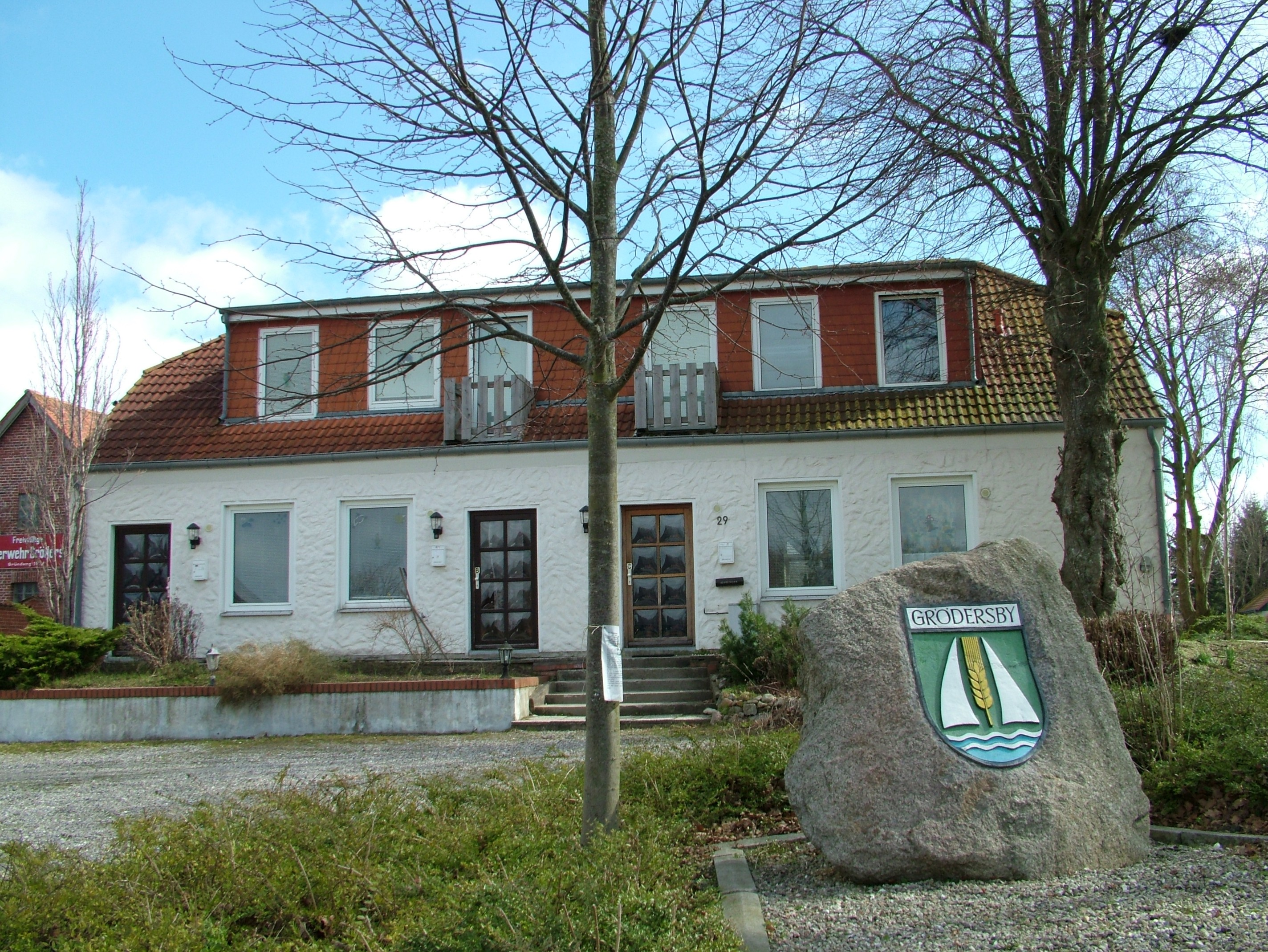 Groedersby, Schleswig-Holstein, Deutschland, die ehemalige Schule.